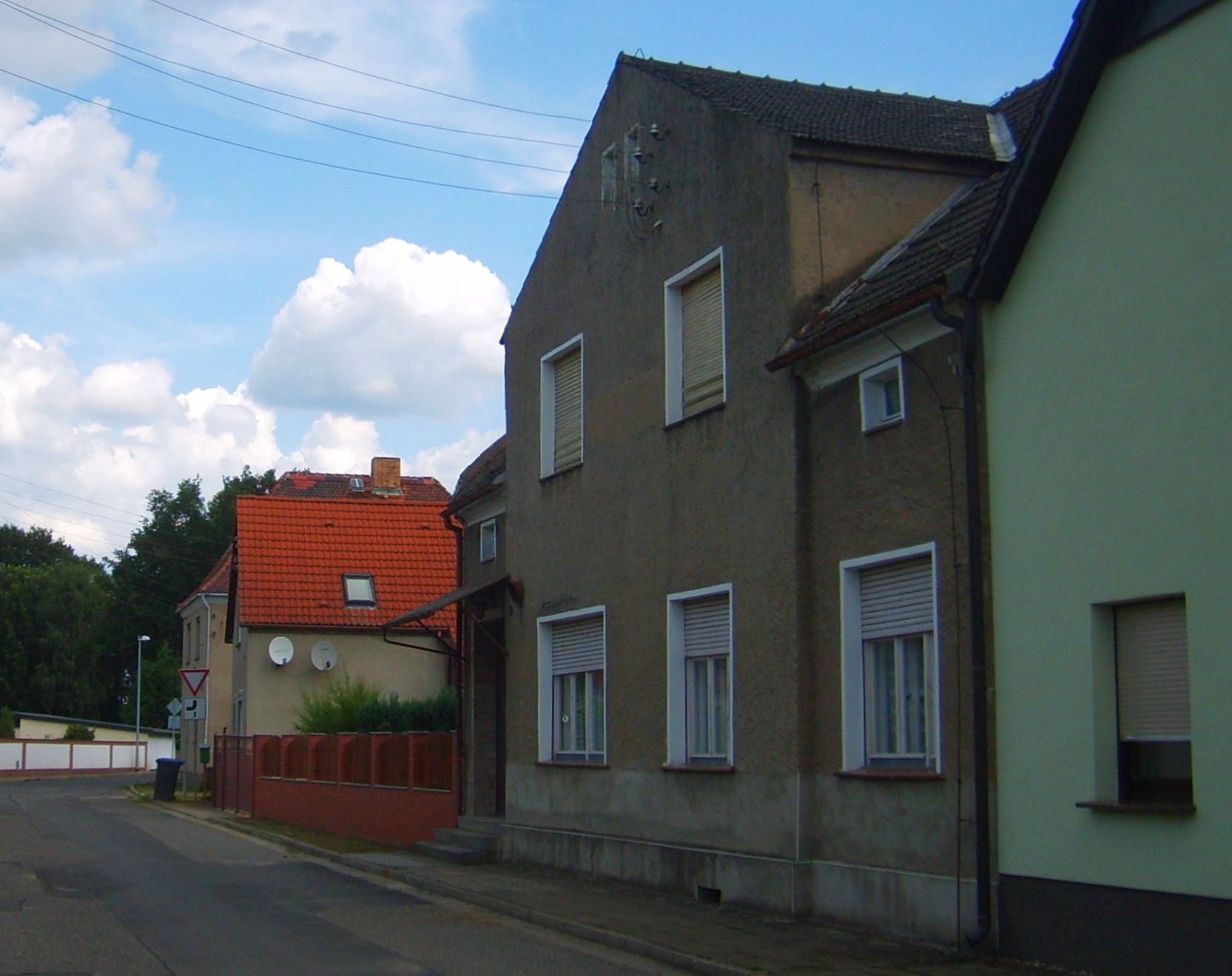 Ehemalige Gaststätte in Würdenhain